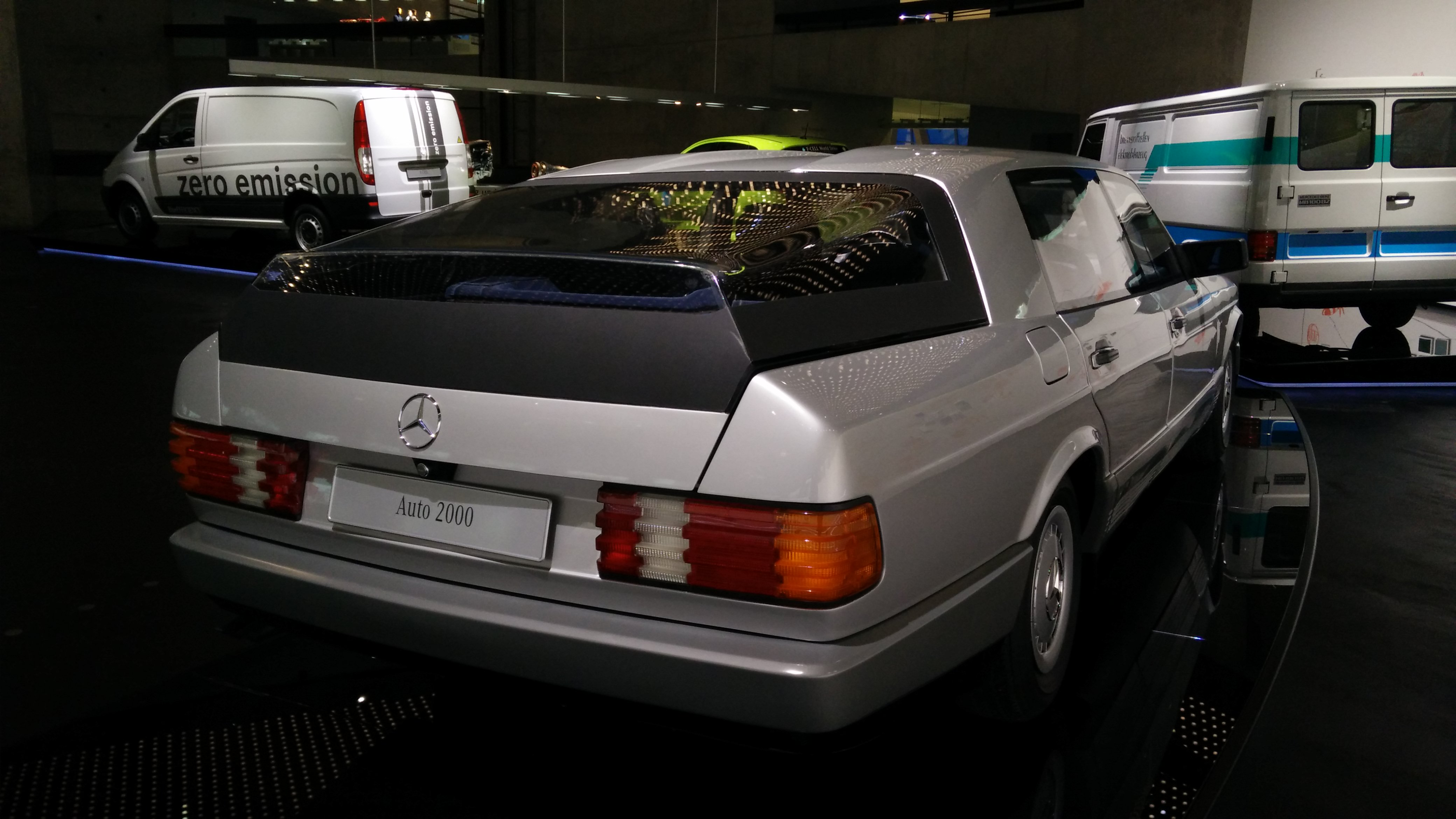 IMG_20141112_164309